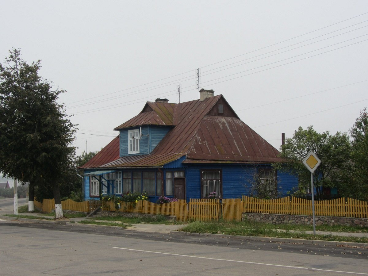 Краявіды Камянца